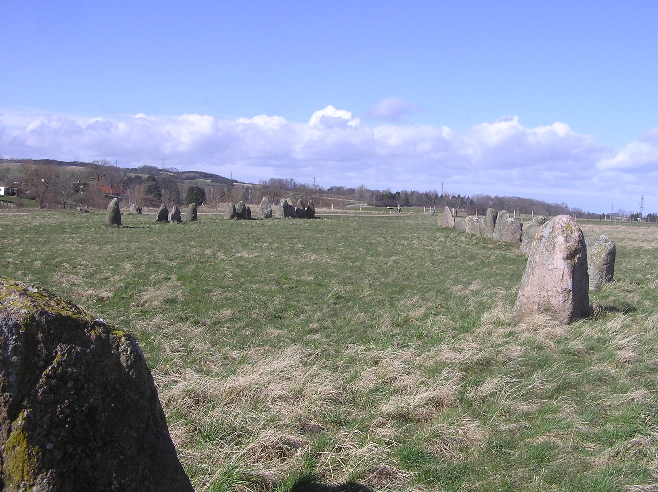 Danmark Sjælland Gammel Lejre:Skibssætning